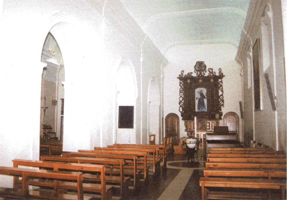 San Giovanni in Fiore - Convento padri Cappuccini - Navata Laterale